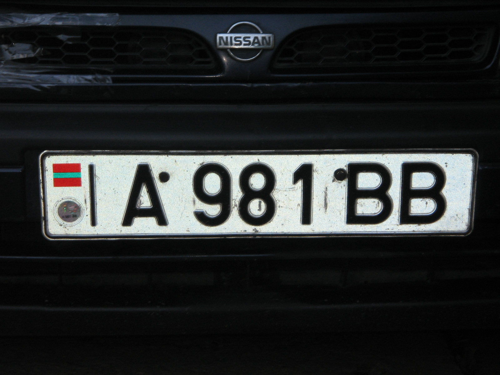 регистрационный номер автомобиля в ПМР